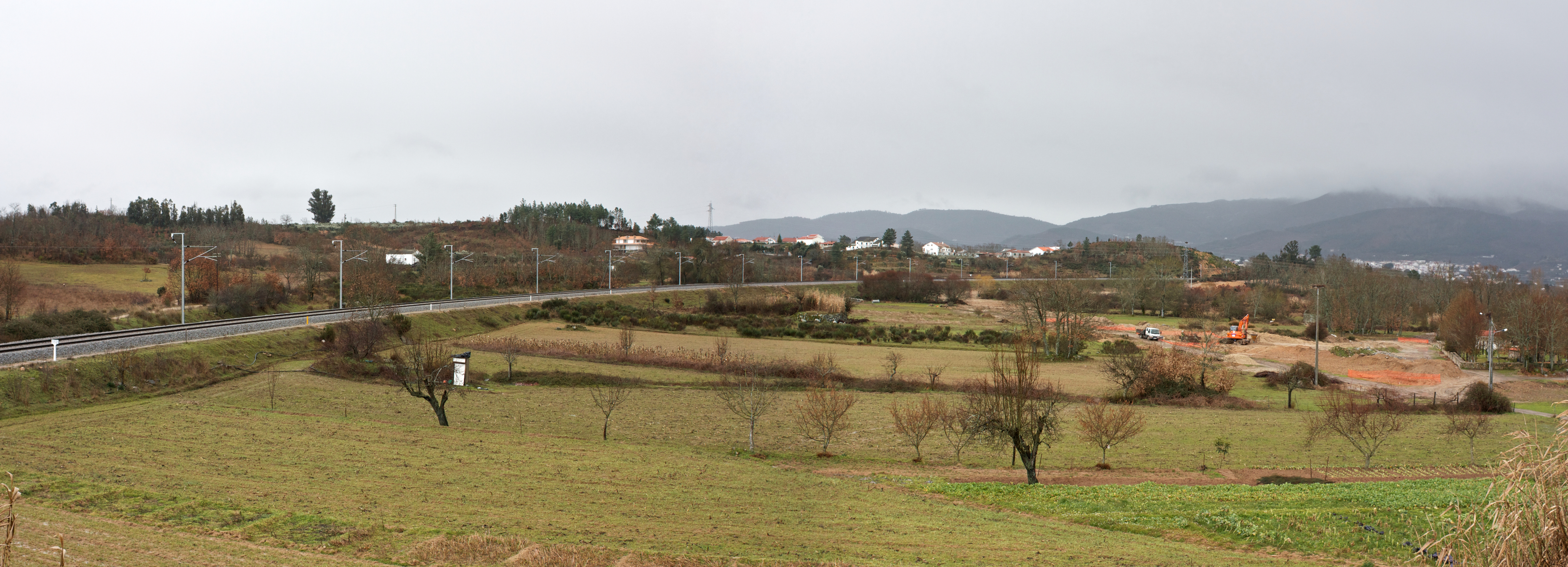 Via férrea: Linha da Beira Baixa [PK 151] Local: Fundão Data e hora: 15 de Fevereiro de 2011 [14h27] Sentido: Entroncamento